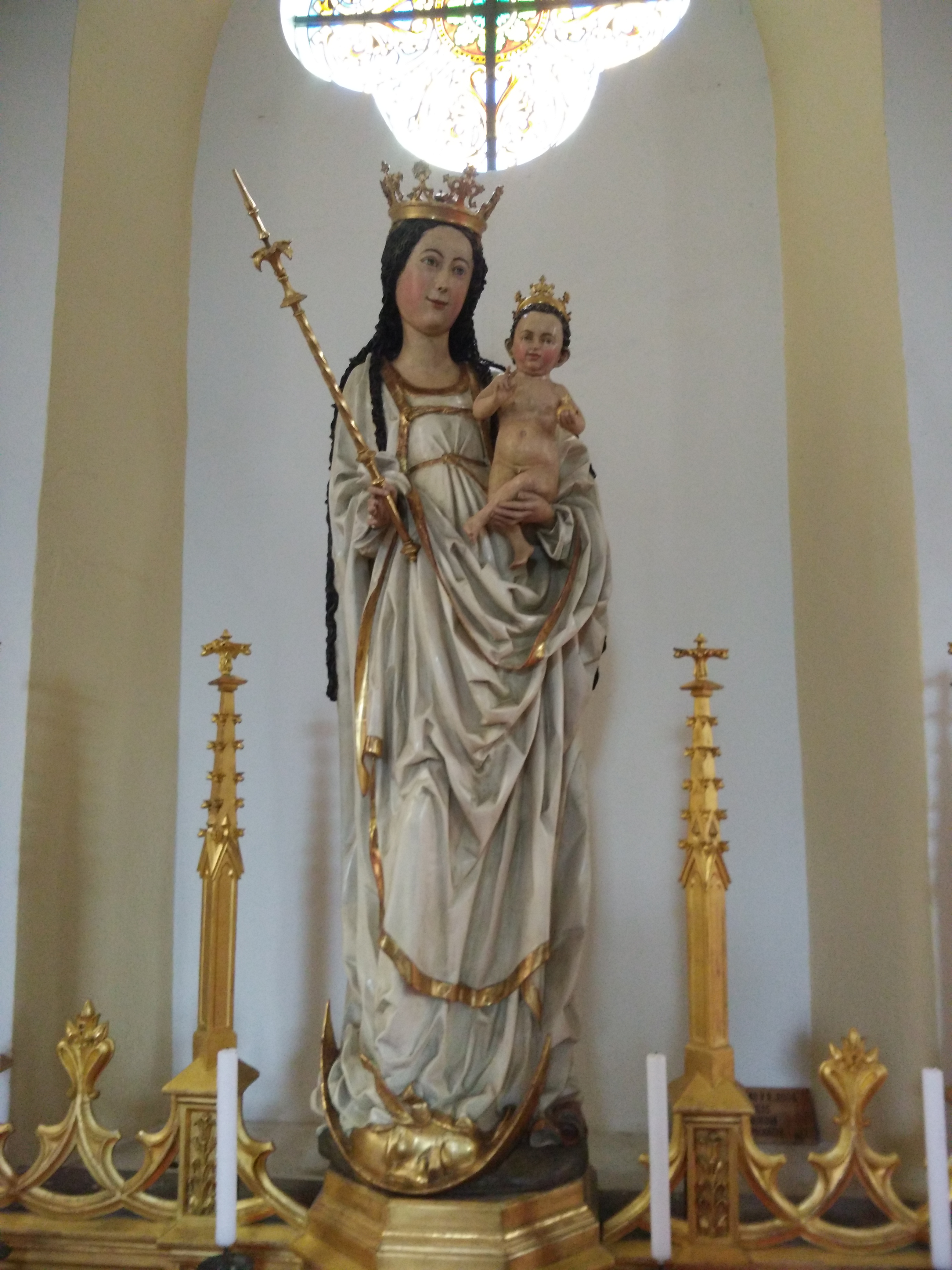 Madona s žezlem v jedné a Ježíškem v druhé ruce